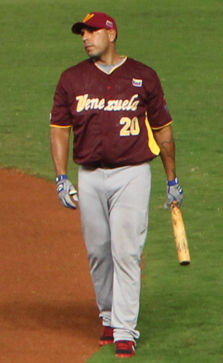 Juan Rivera